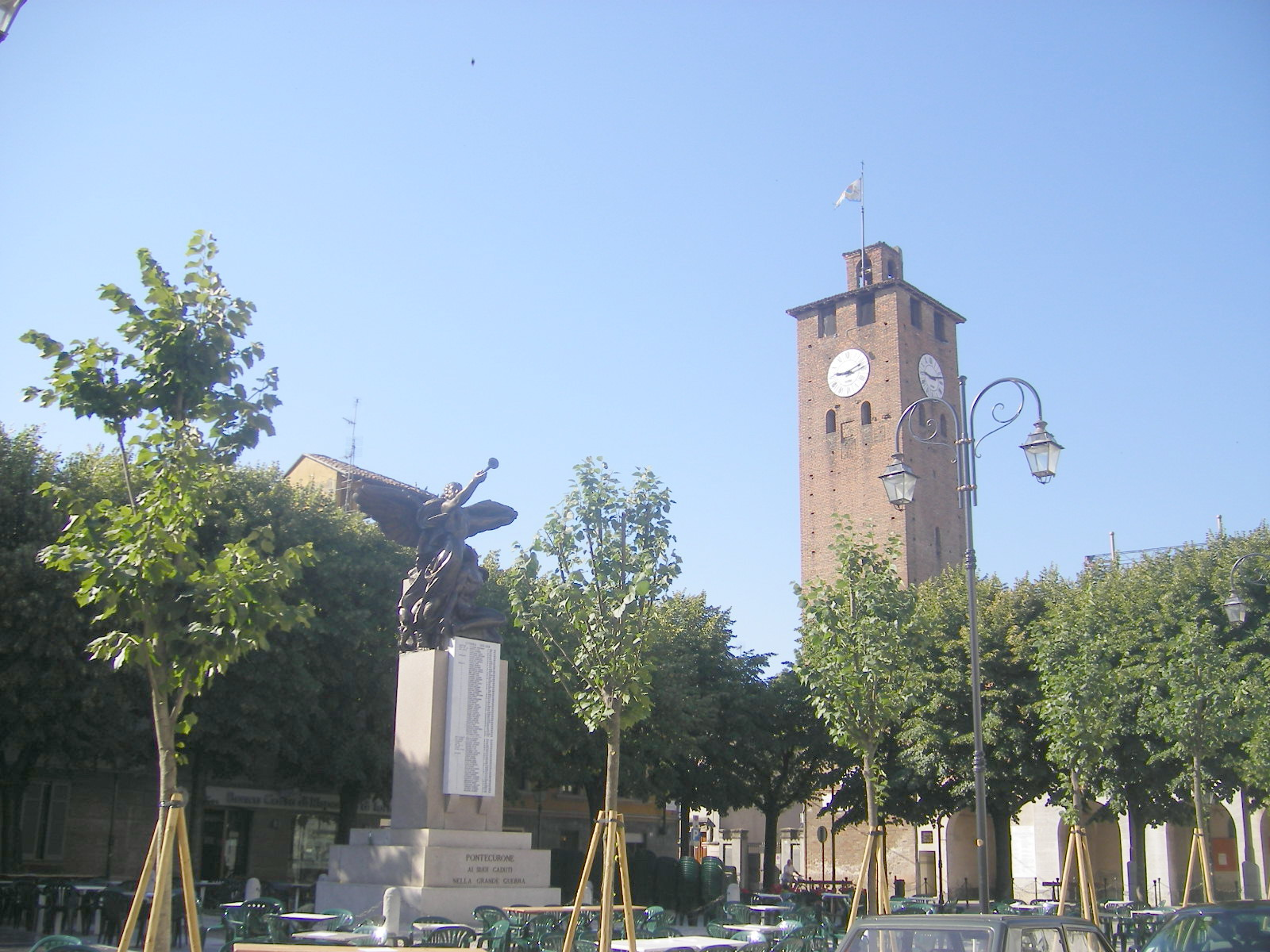 Pontecurone - main square